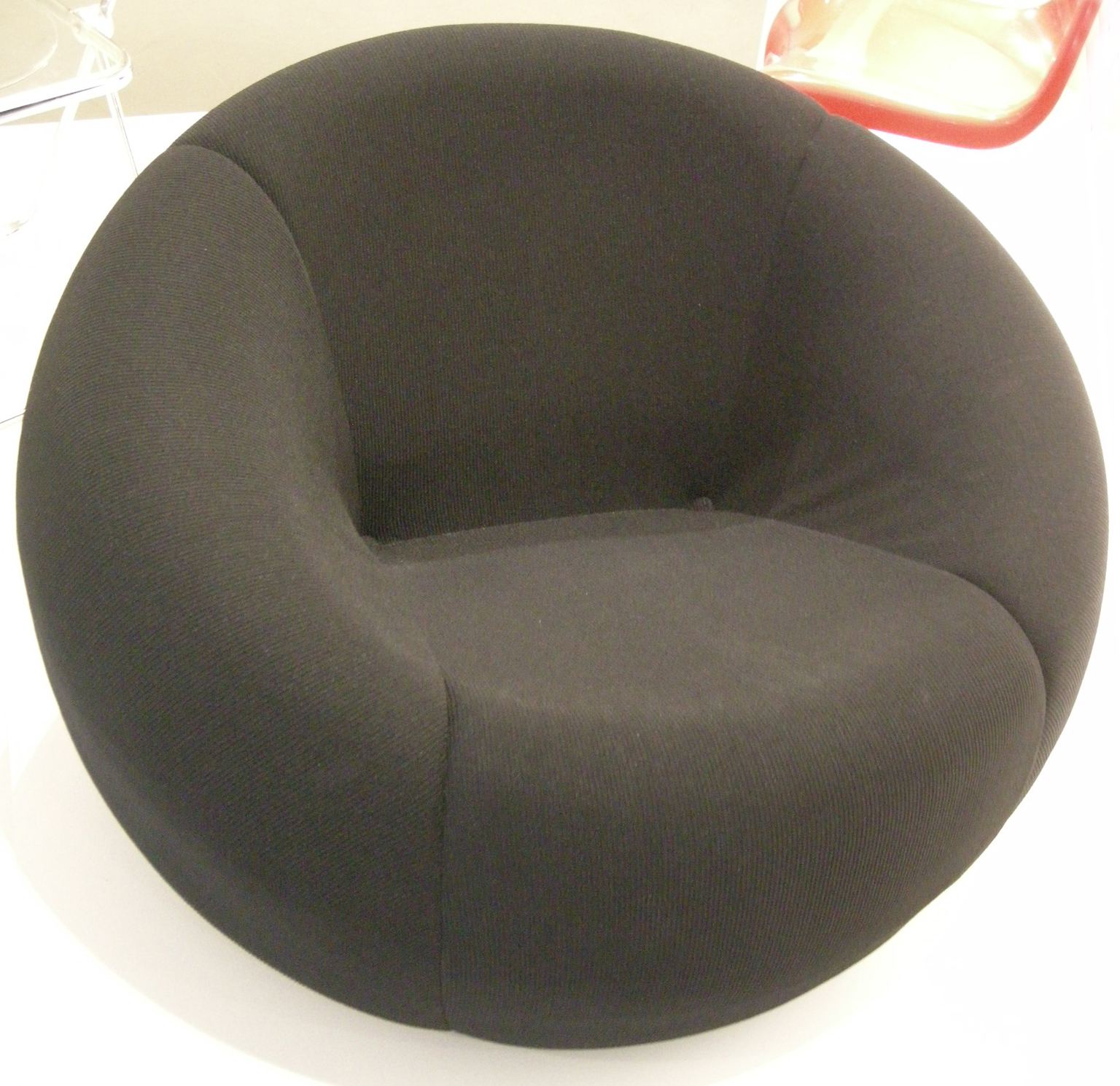 Ngv design, gaetano pesce, up chair, 1969